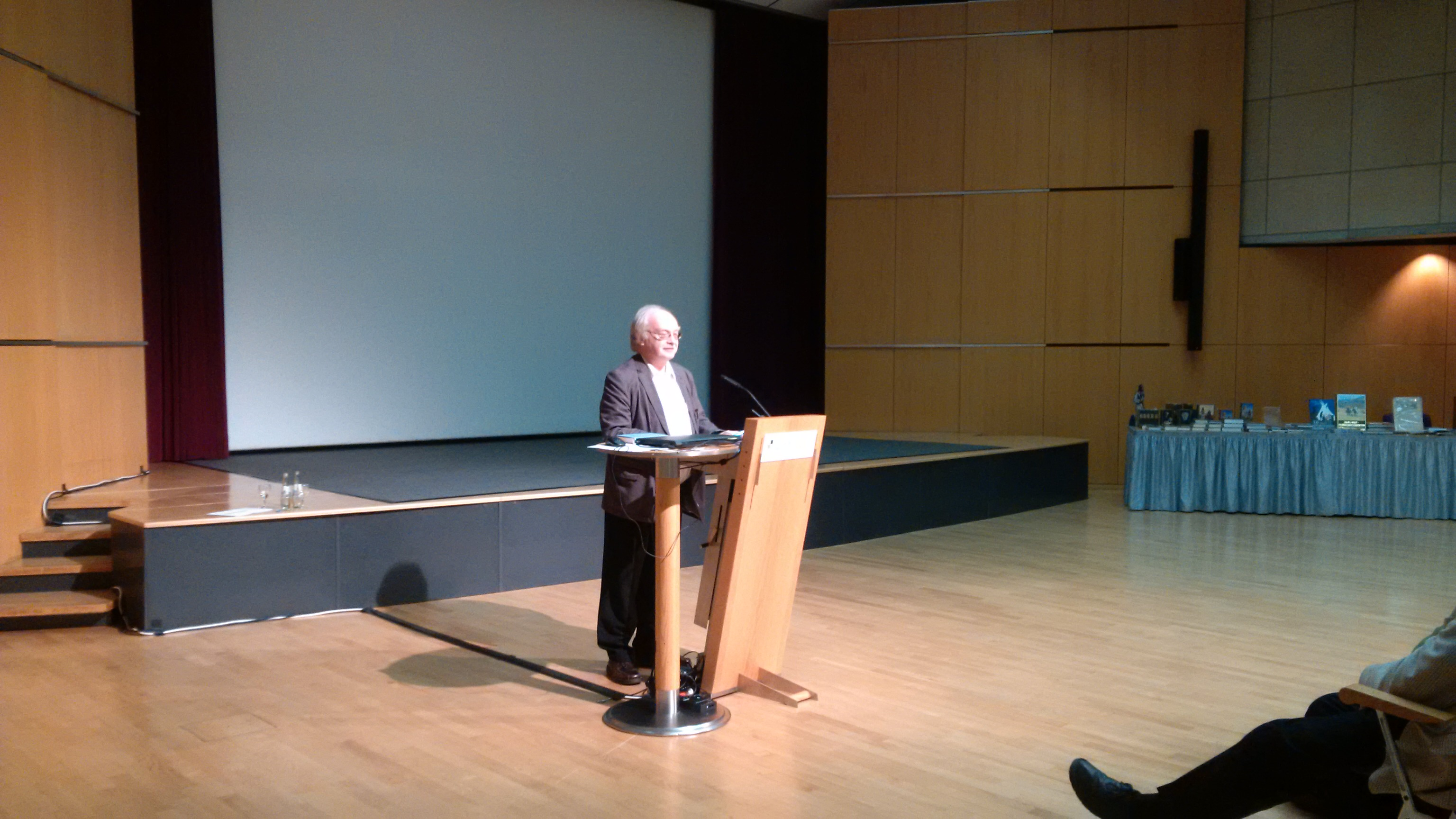 Rudi Schweikert bei einem Symposium der Karl-May-Gesellschaft in Bonn